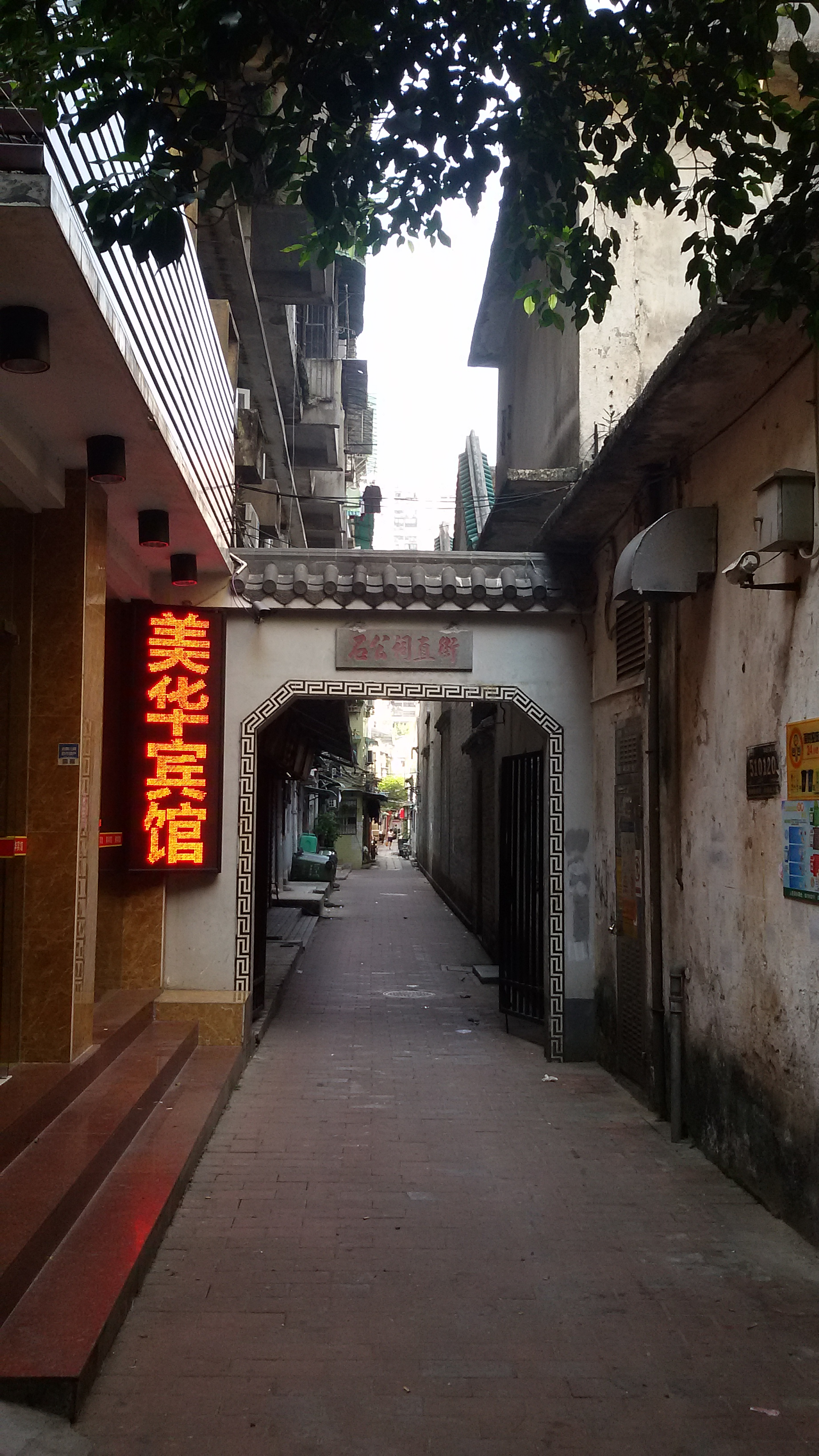 粵語: 石公祠直街嘅牌坊